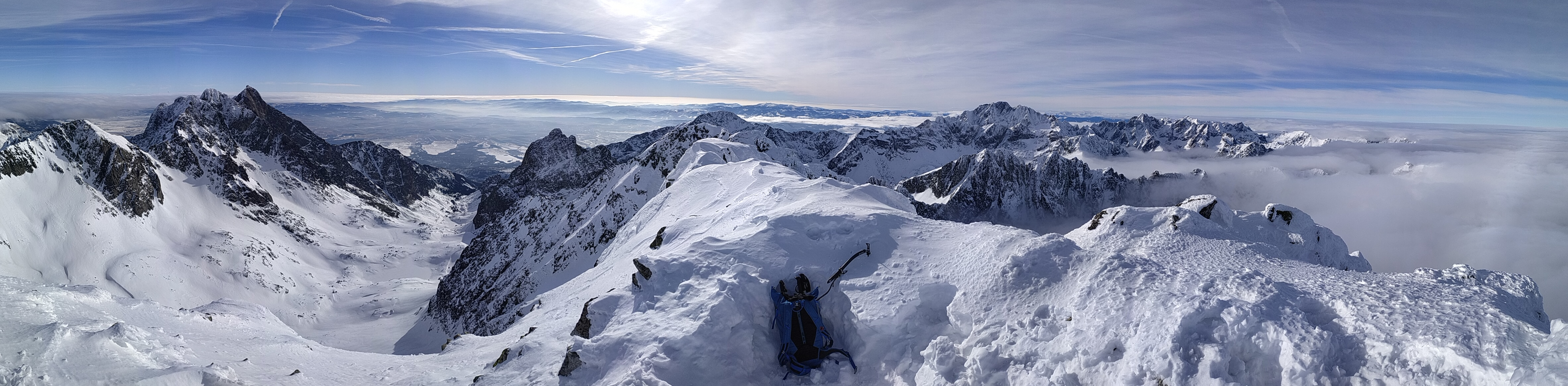 Widok z Lodowego Szczytu